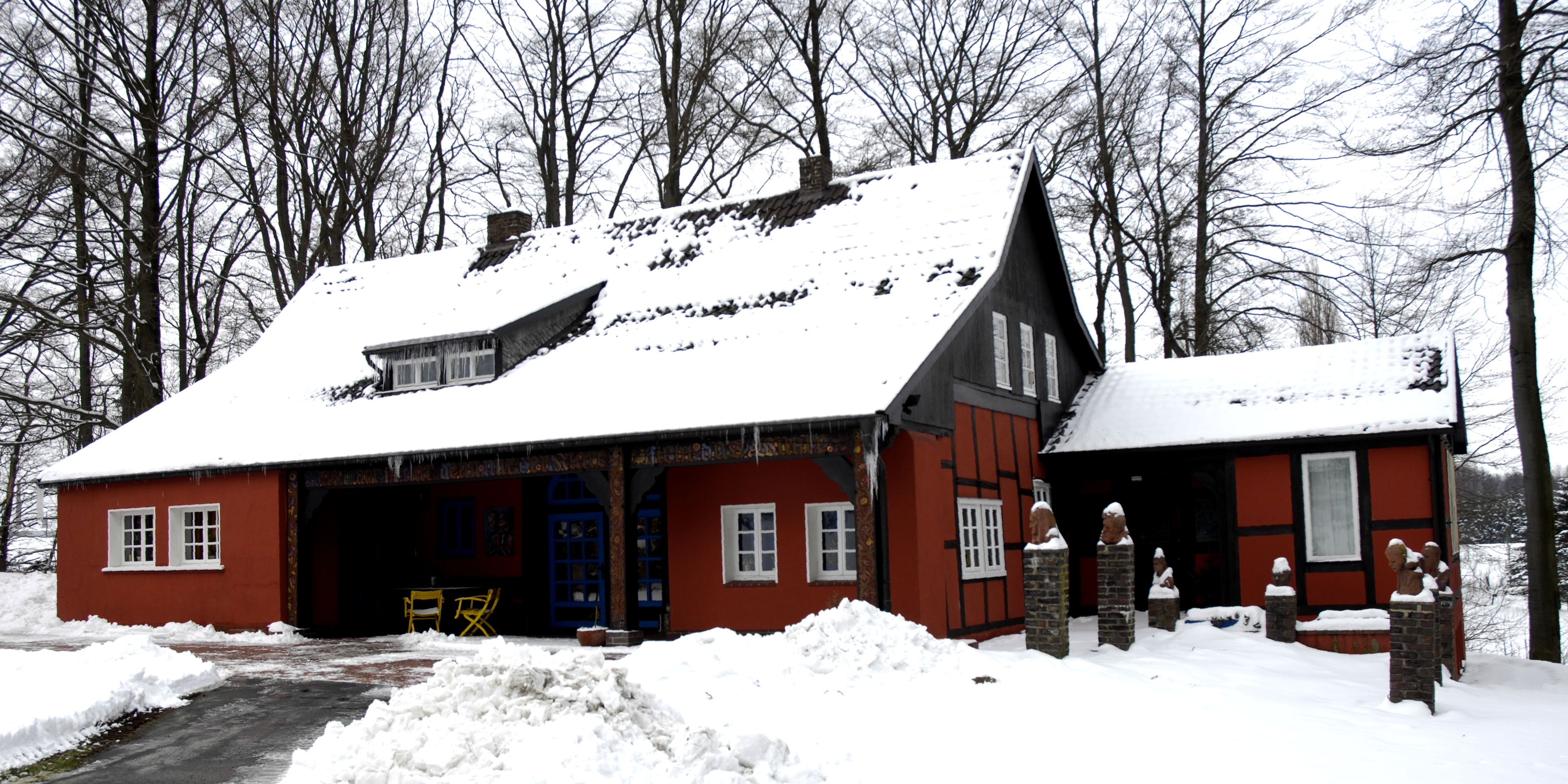 Böckstiegel-Haus in Werther-Arrode, Januar 2010